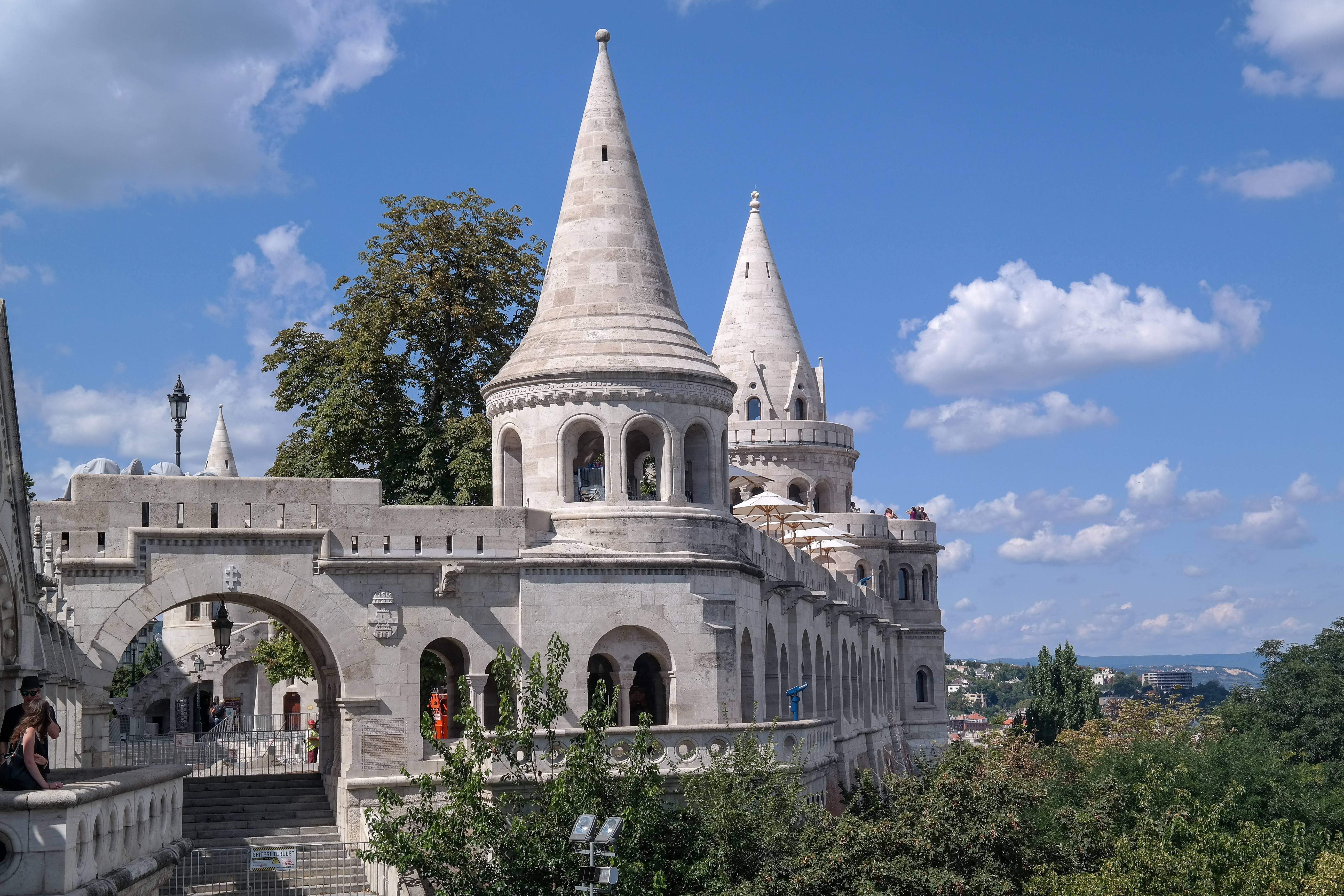 Nördlicher Teil der Fischerbastei in Budapest, Ungarn. Blick nach Norden.